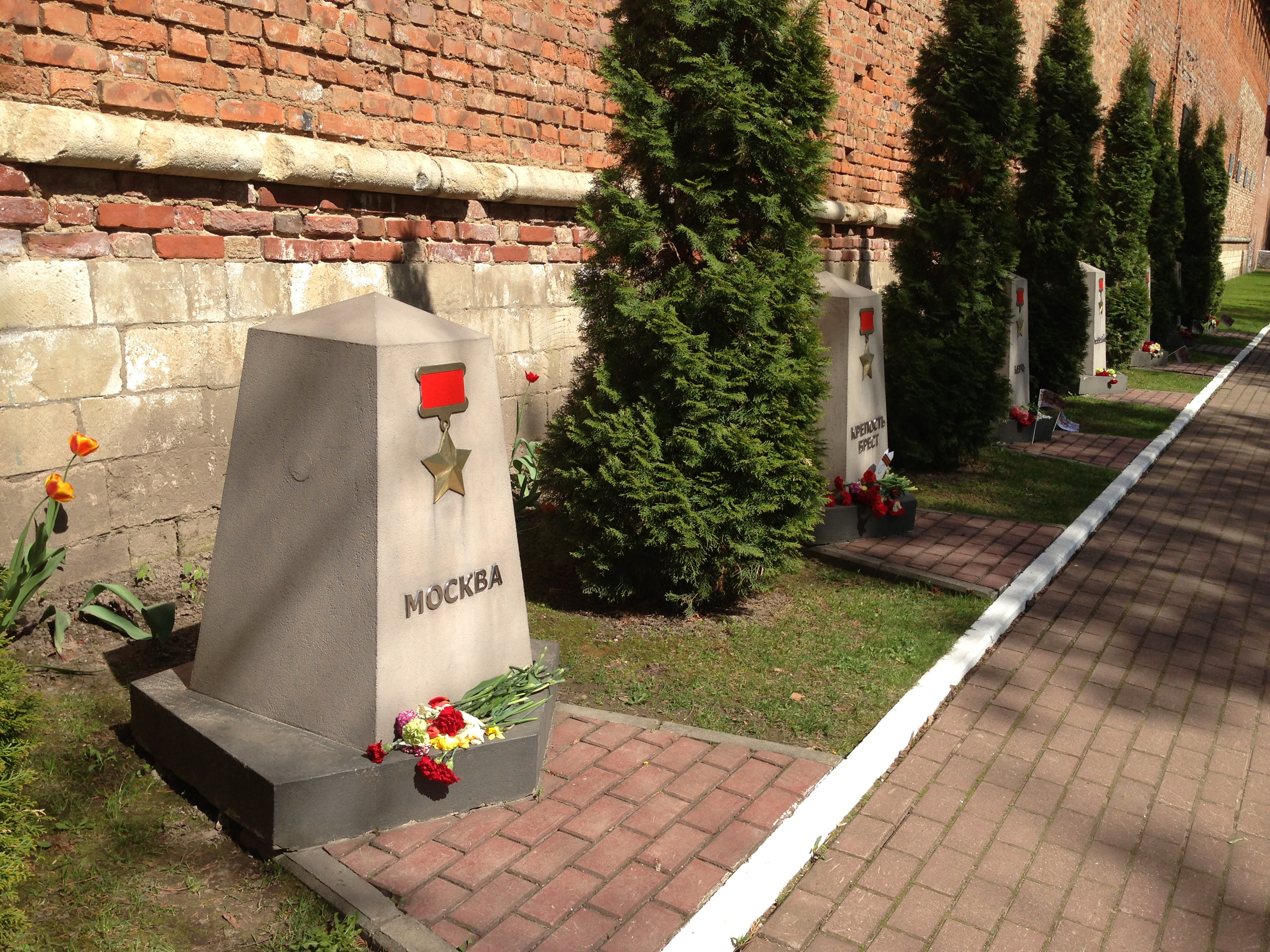 Смоленская крепость